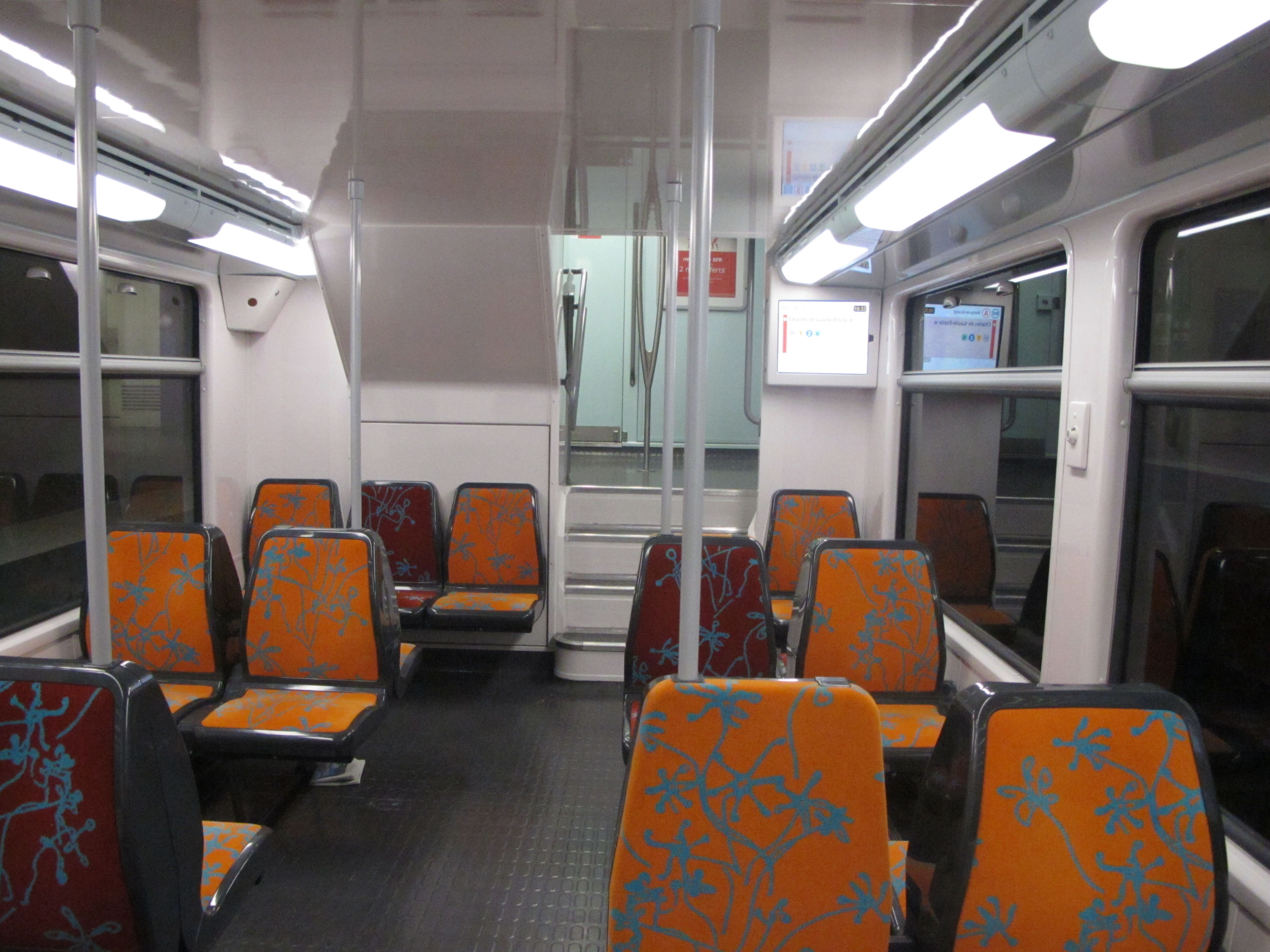 Intérieur d'une rame MI09 du RER A, Ile de France. France